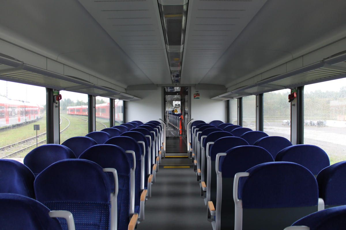 Przedział 2. klasy w pojeździe Stadler GTW dla Arriva NL na terenie zakładu Stadler Polska w Siedlcach. This photo was taken during Railway Wikiexpedition 2014 set up by Wikimedia Polska Association in cooperation with Fundacja Grupy PKP. You can see all photographs in category Wikiekspedycja kolejowa 2014.